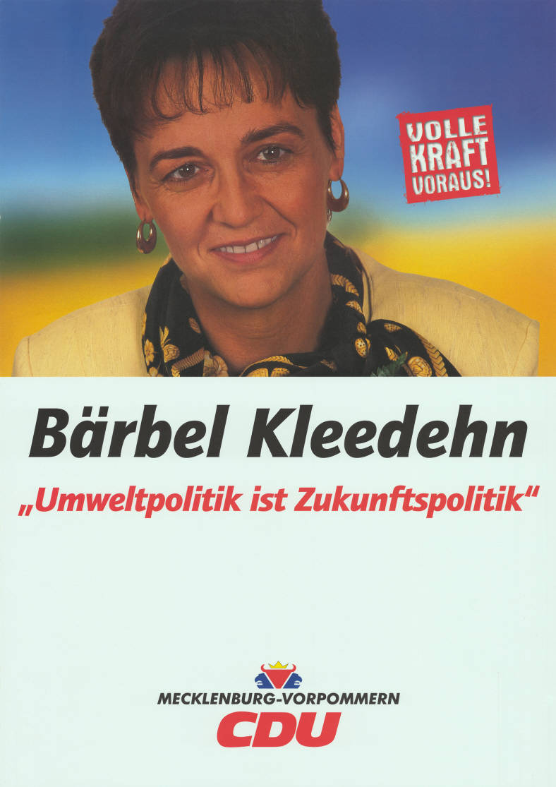 Volle Kraft voraus! Bärbel Kleedehn "Umweltpolitik ist Zukunftspolitik" Mecklenburg-Vorpommern CDUAbbildung:PorträtfotoPlakatart:Kandidaten-/Personenplakat mit PorträtAuftraggeber:CDU Mecklenburg-VorpommernObjekt-Signatur:10-034 : 307Bestand:Landtagswahlplakate Mecklenburg-Vorpommern (10-034)GliederungBestand10-18:Landtagswahlplakate Mecklenburg-Vorpommern (10-034) » CDULizenz:KAS/ACDP 10-034 : 307 CC-BY-SA 3.0 DE